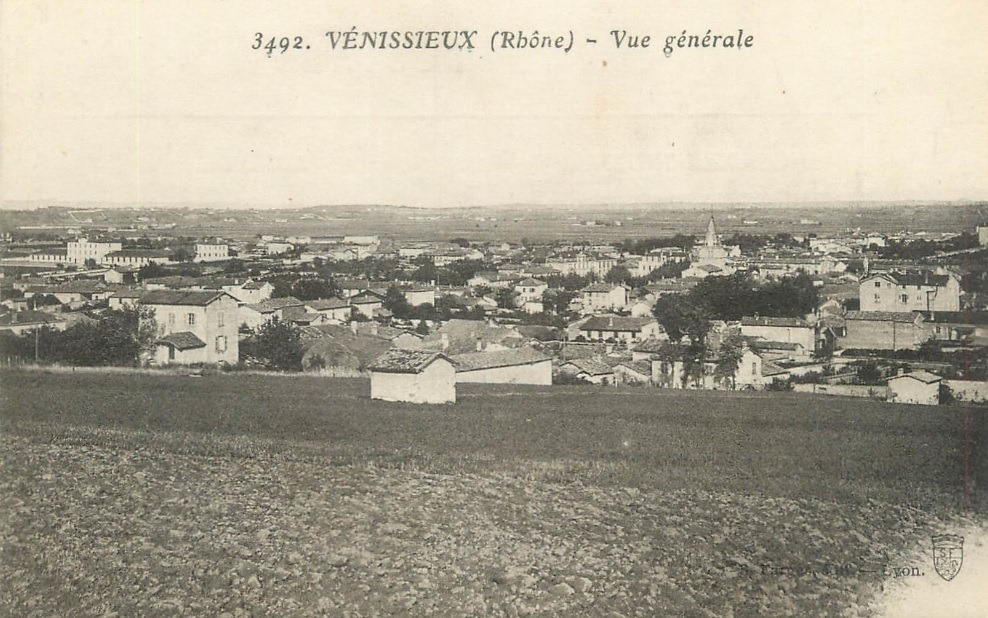 Vue générale sur Vénissieux, au début du 20ème siècle.